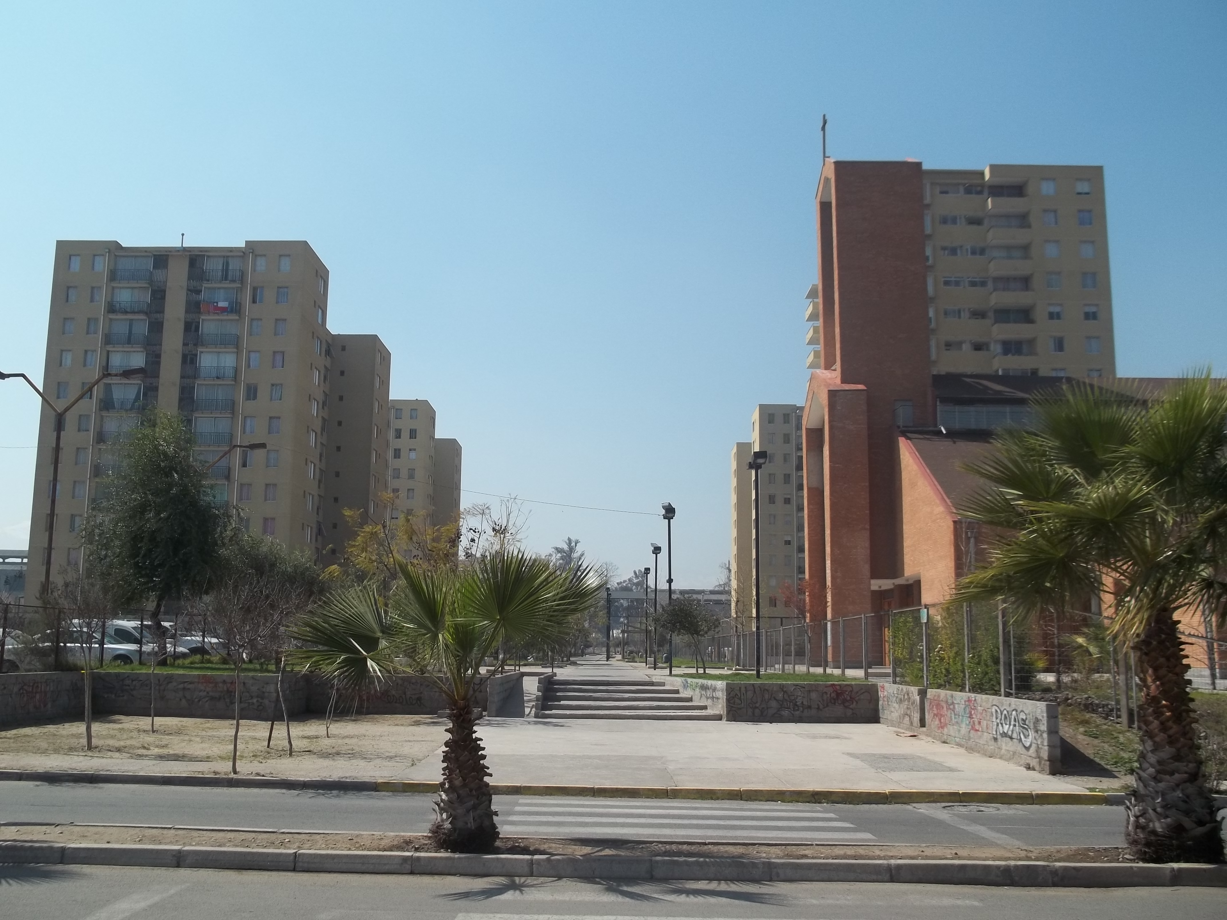 maestranza